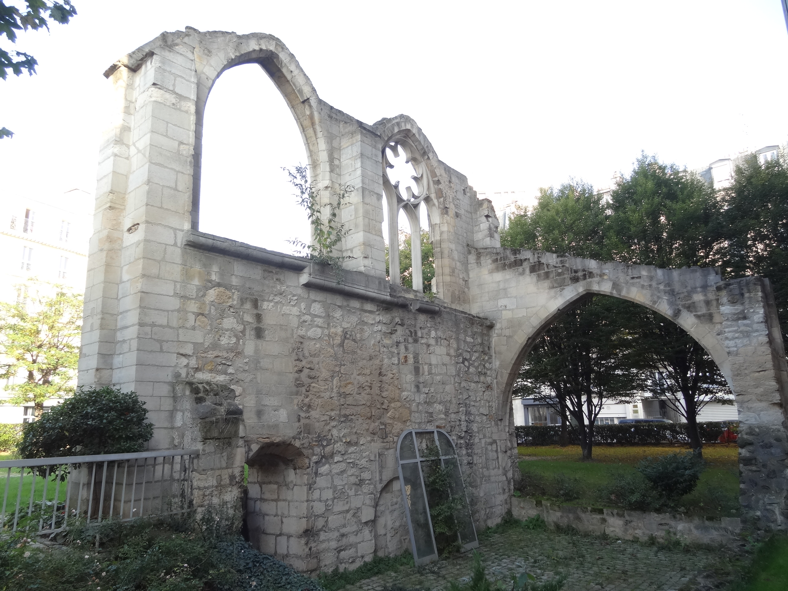 Paris 13e arrondissement - Jardin de l'hôpital Broca - ruines du couvent des Cordelières